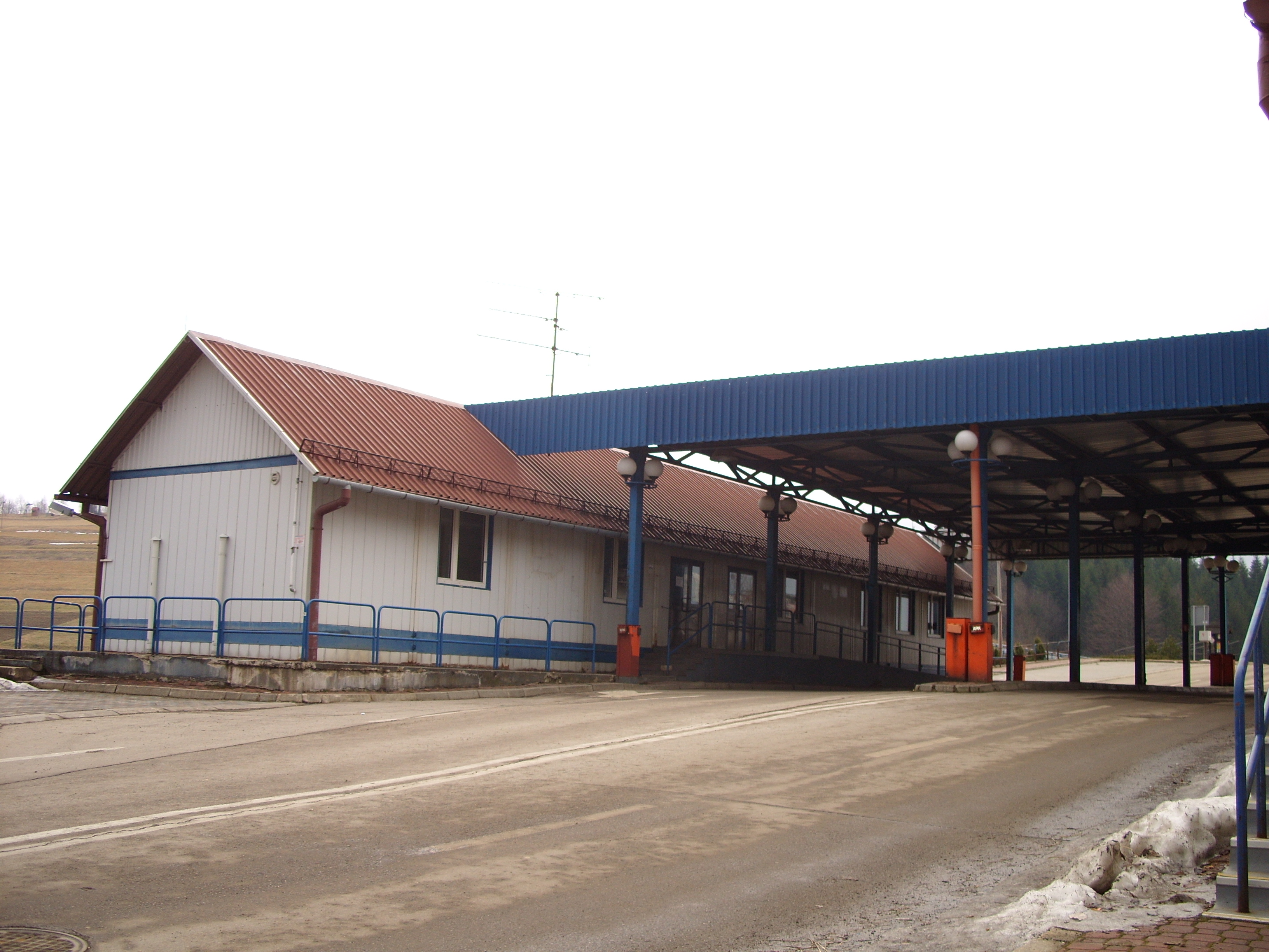 d. przejscie graniczne Zwardoń/Myto-Skalite